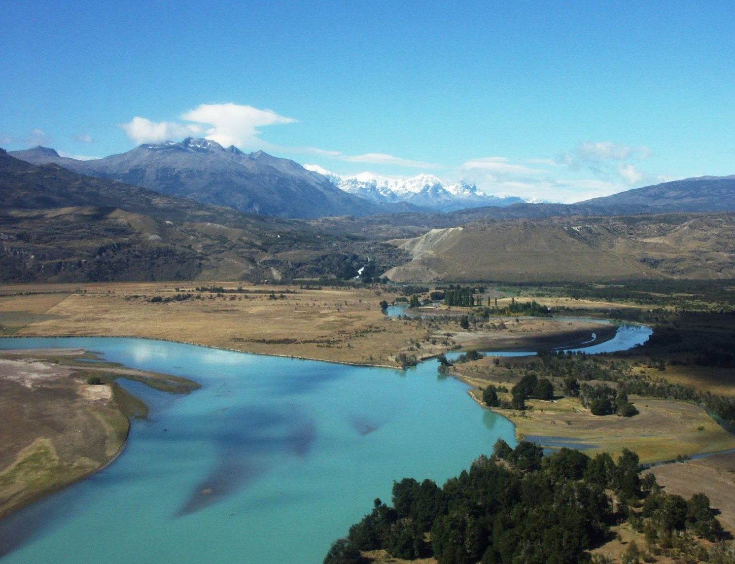 Confluencia ríos El Salto y Baker